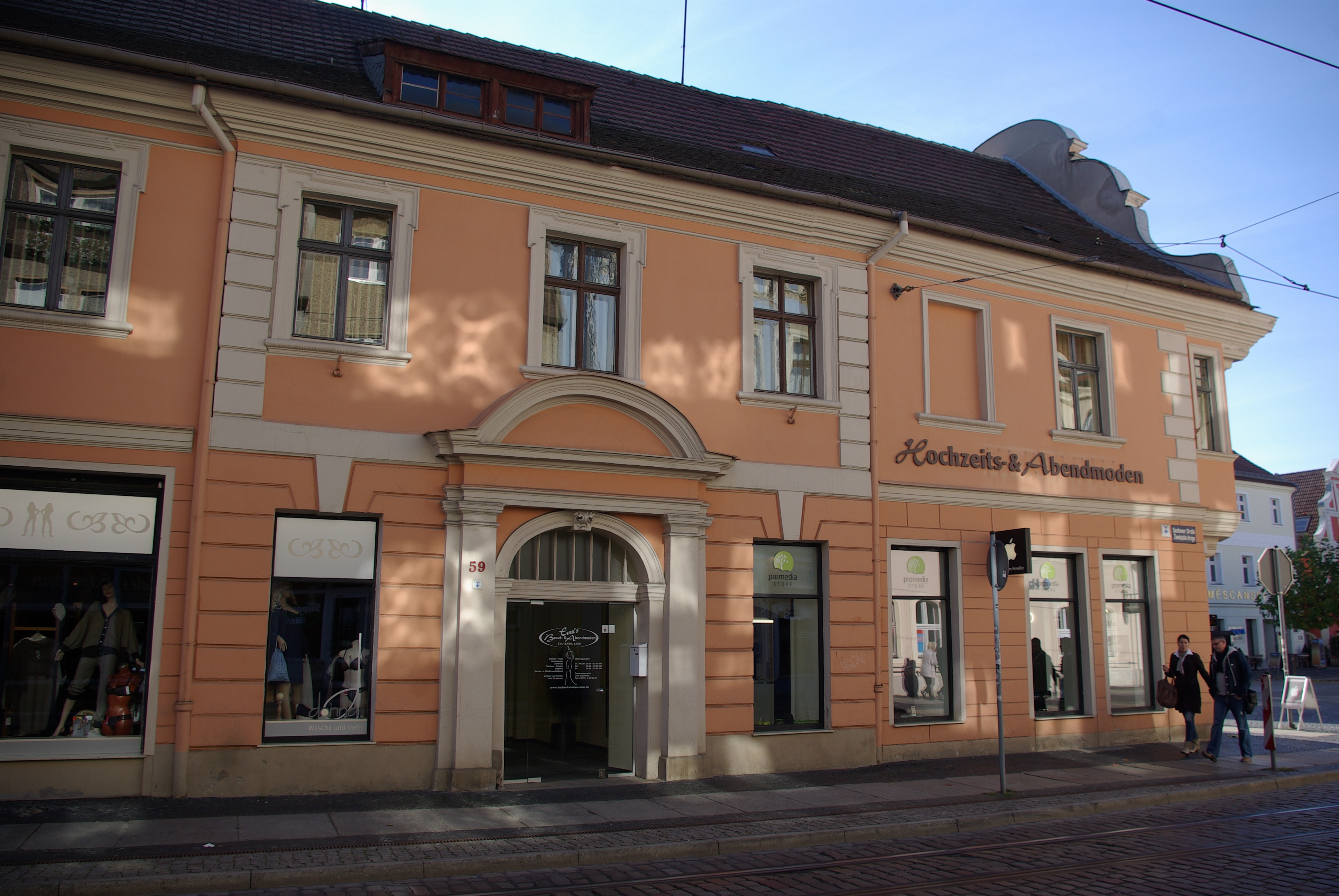 Cottbus in Brandenburg. Das Haus in der Sandower Straße 59 Ecke Altmarkt steht unter Denkmalschutz.